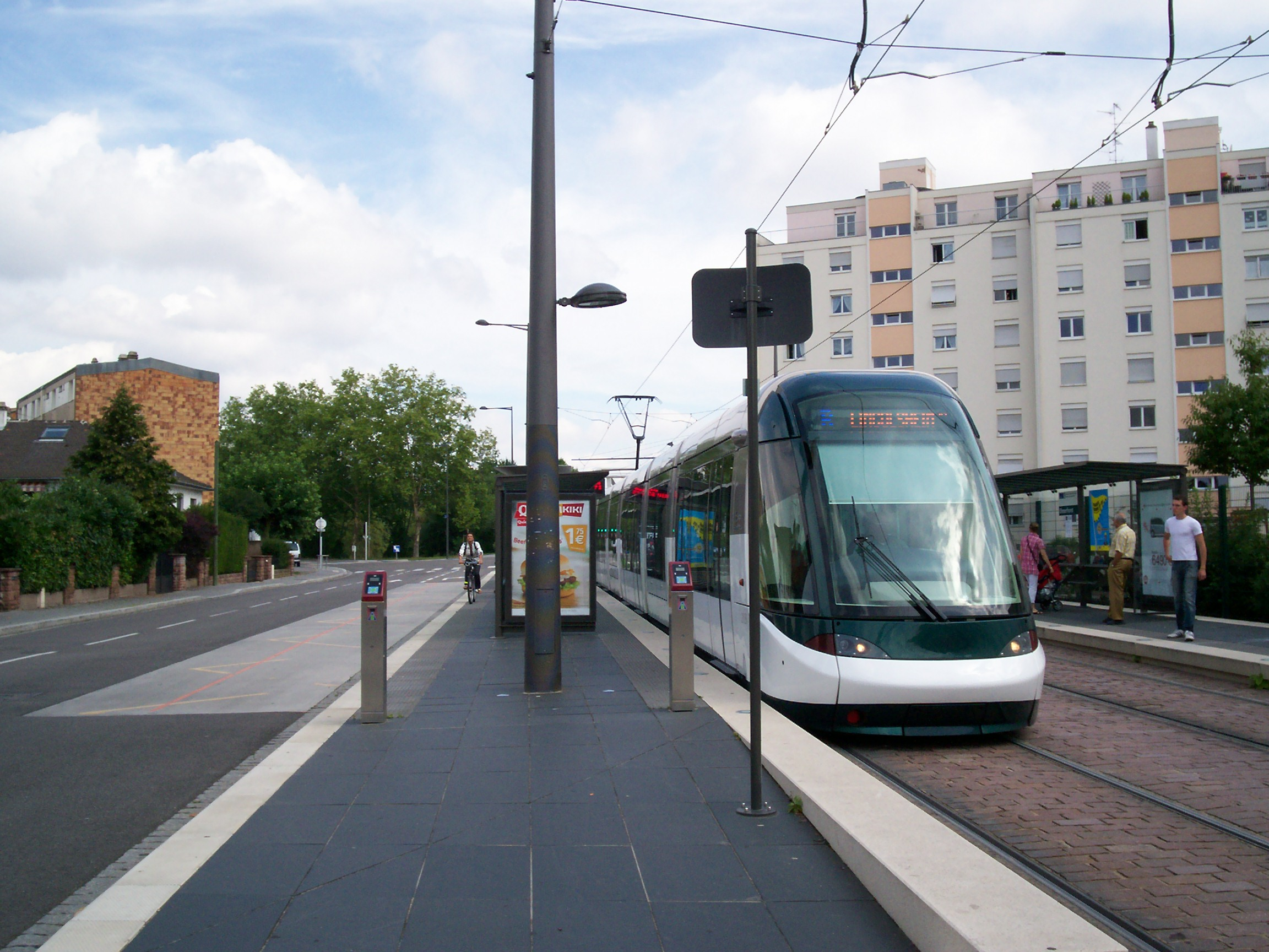 Tramway de Strasbourg ligne B à Elmerforst, le 14 Août 2009